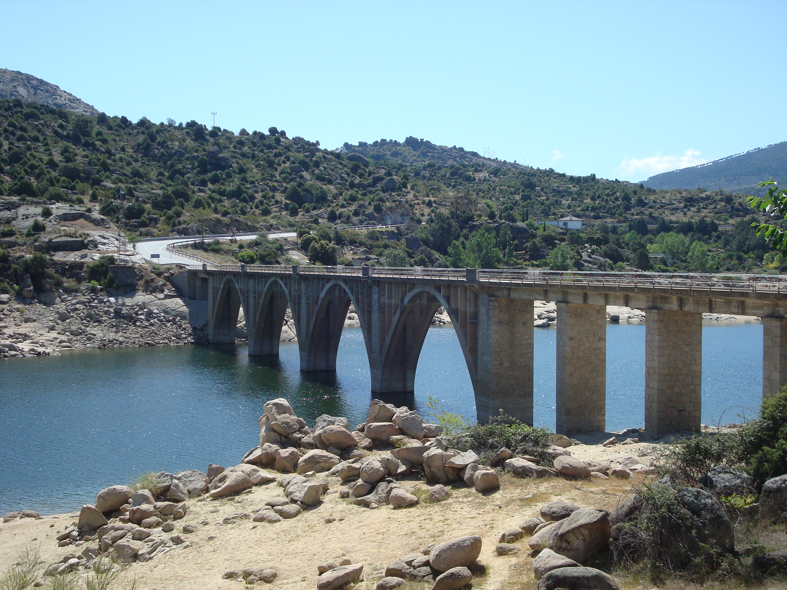 Embalse de El Burguillo - 001